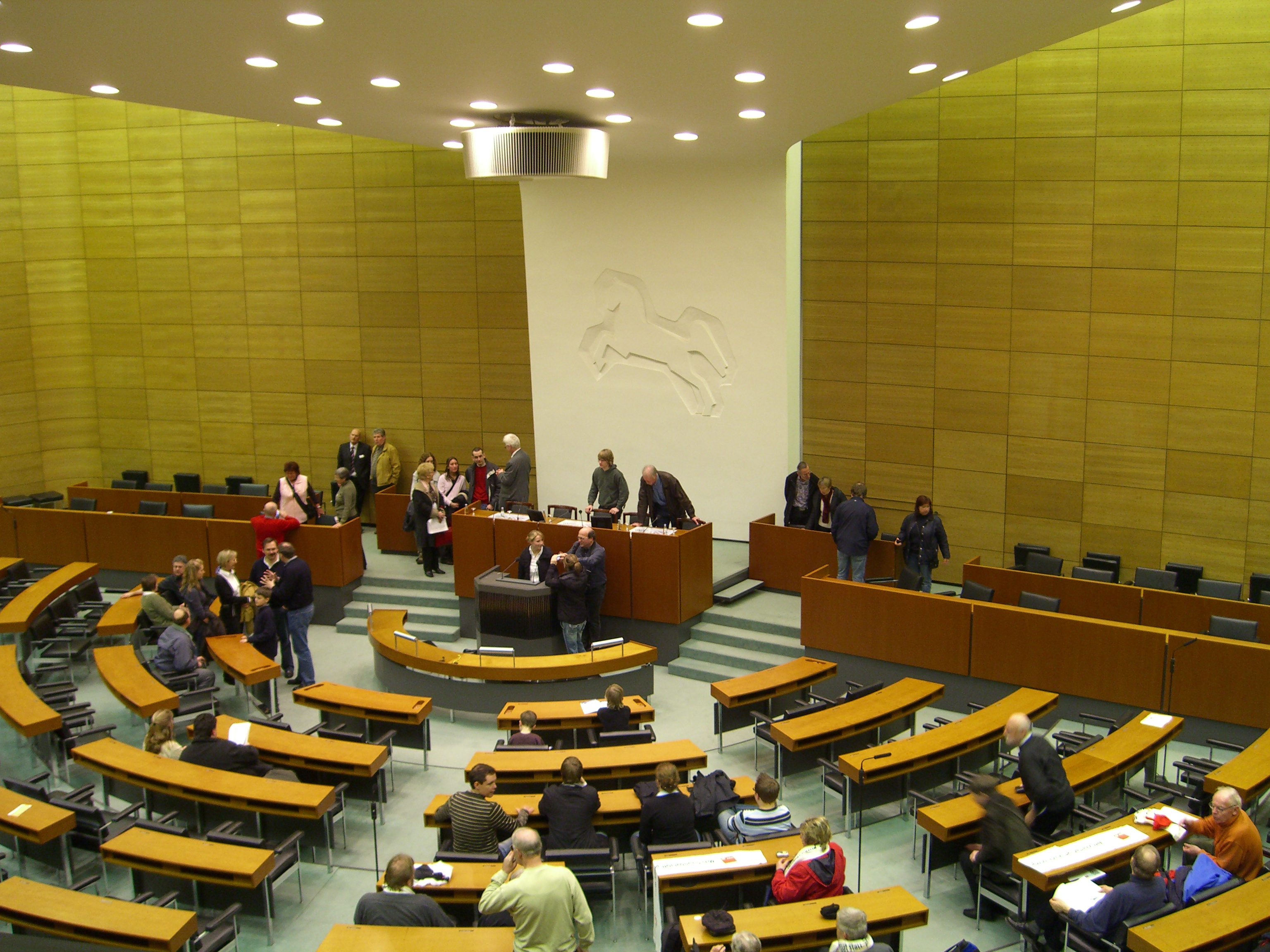 Plenarsaal des Niedersächsischen Landtags in Hannover